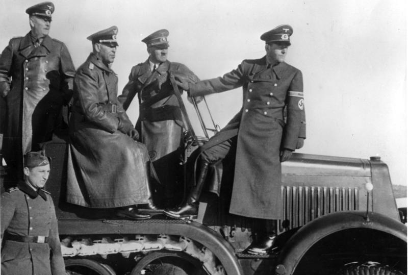 Der Führer [Adolf Hitler] mit Reichsminister [Albert] Speer [ganz rechts] bei einer Vorführung neuer Waffen [ganz links: Keitel] [Herausgabedatum] 6.4.43